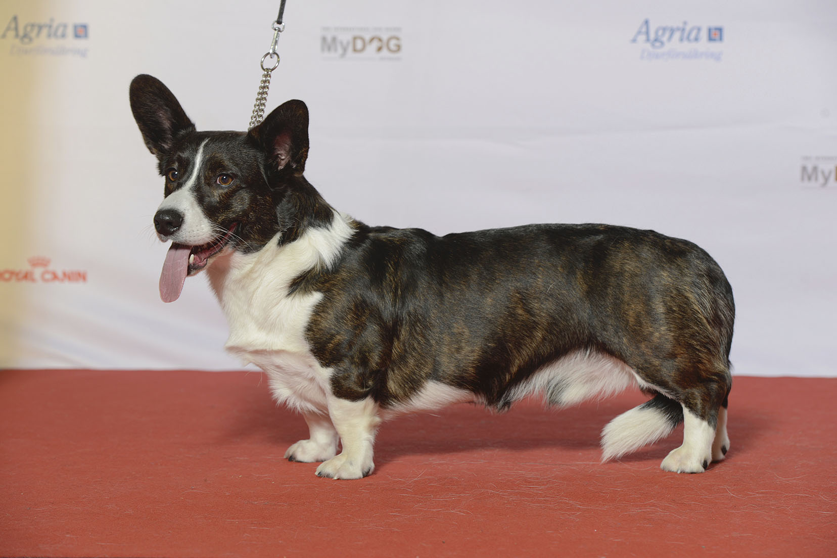 WELSH CORGI CARDIGAN, Nickname’s Bangaway MyDOG, Nordens största hundevenemang